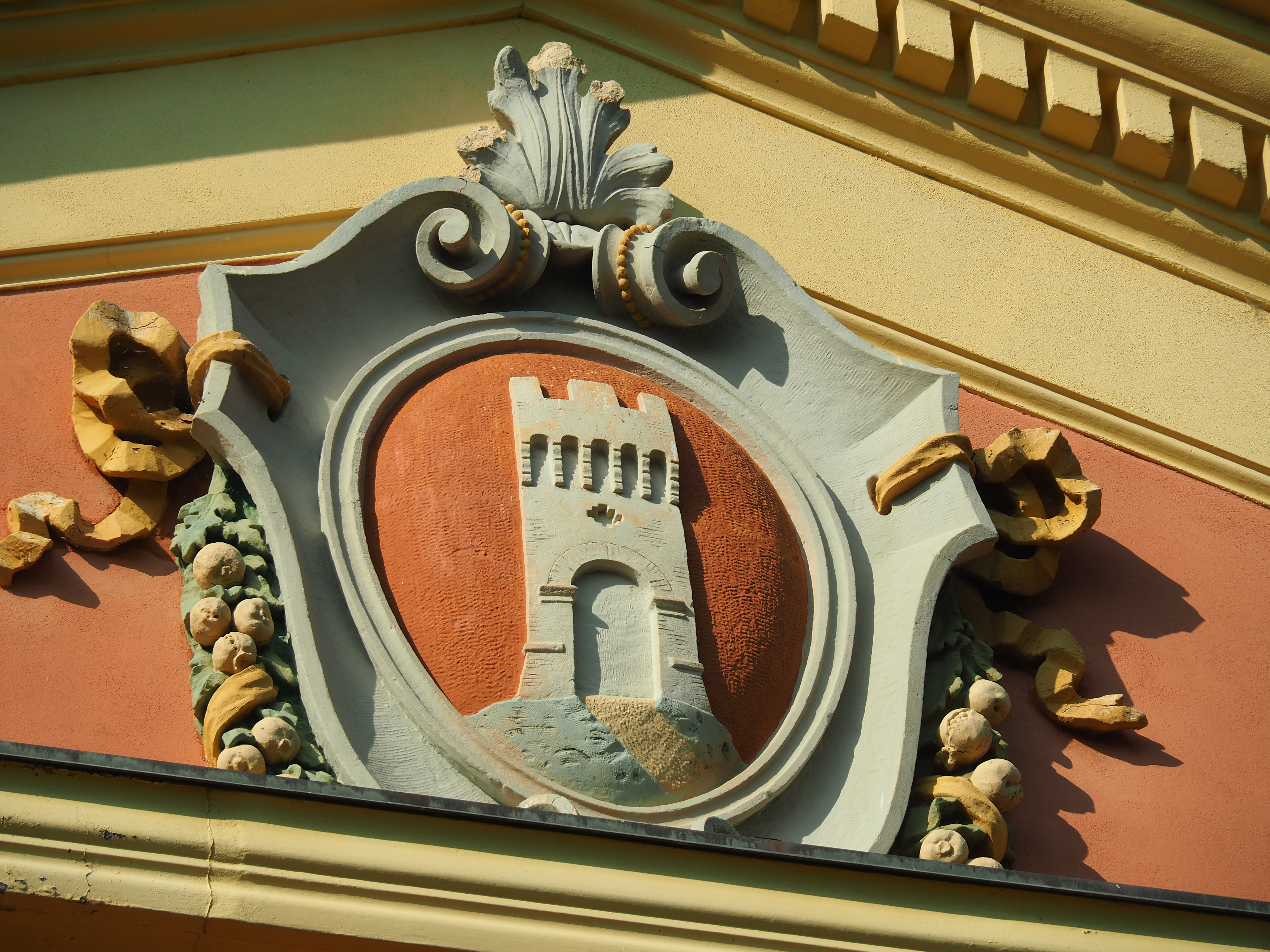 palazzo municipale - Monumento ai Caduti This is a photo of a monument which is part of cultural heritage of Italy.